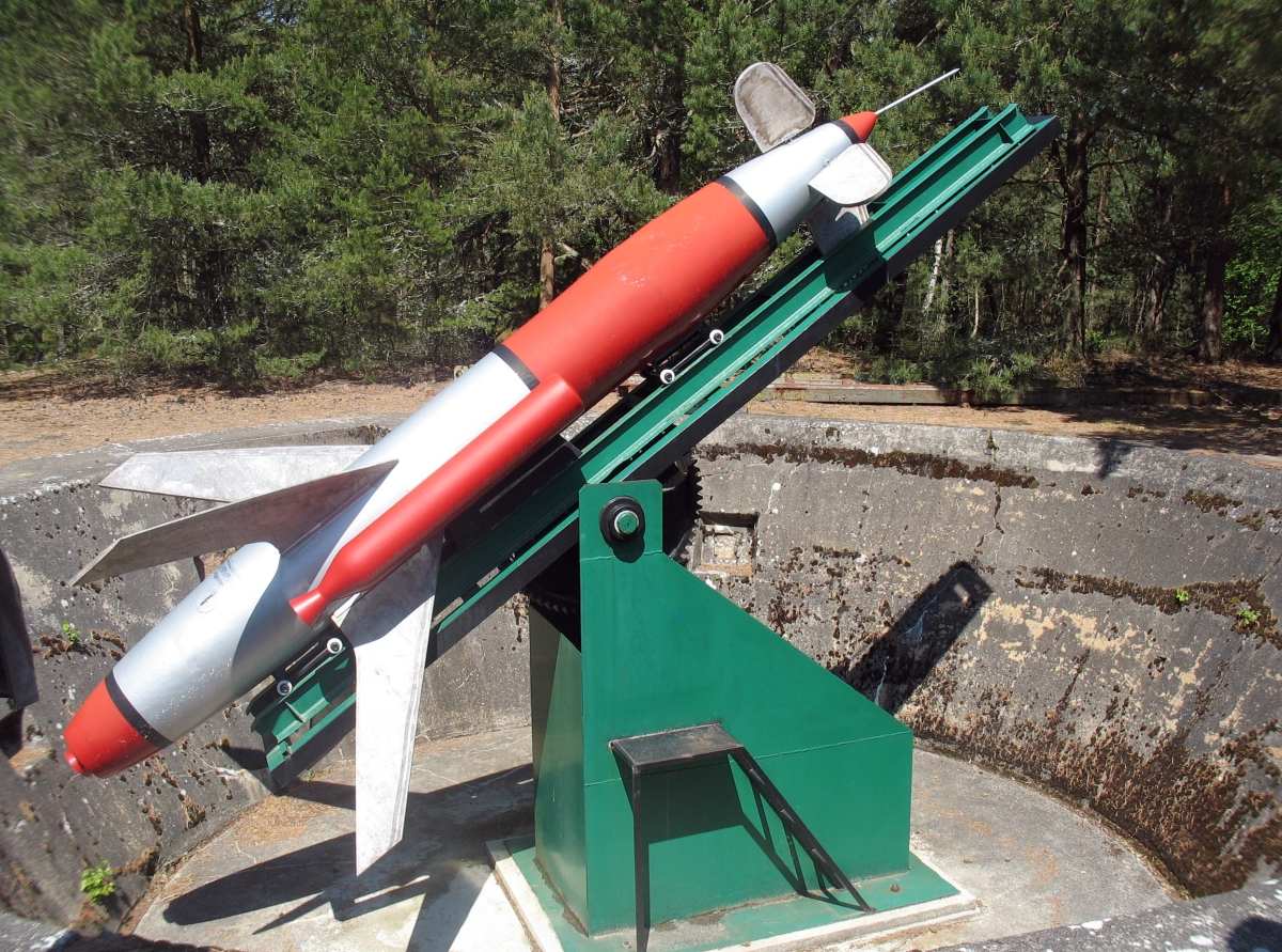 Rekonstrukcja rakiety Rheintochter R3 na wyrzutni na poligonie w Łebie (obecnie muzeum)